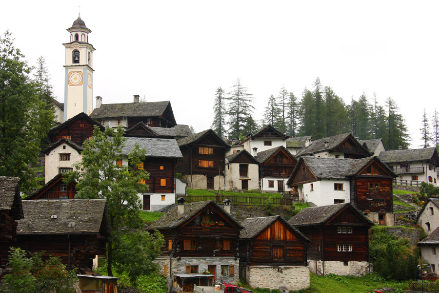 Veduta dell'abitato di Bosco Gurin (TI-CH)